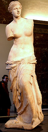 Venus de Milo statue, Louvre museum